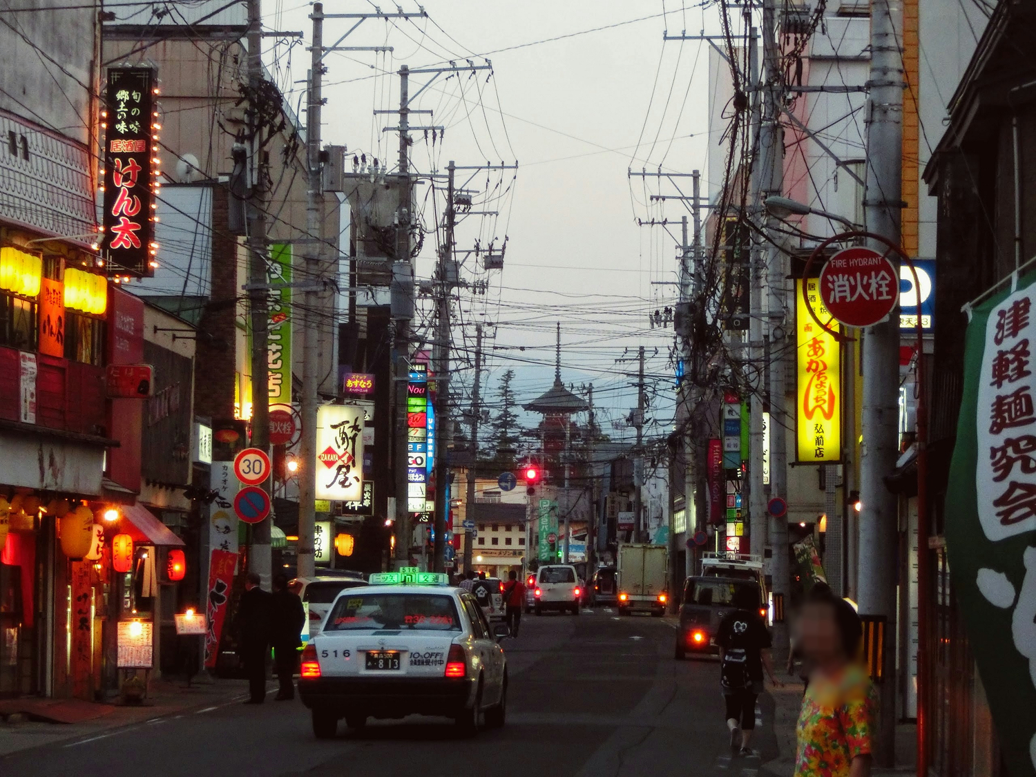 青森県弘前市にある繁華街のひとつ、「鍛冶町」の様子。